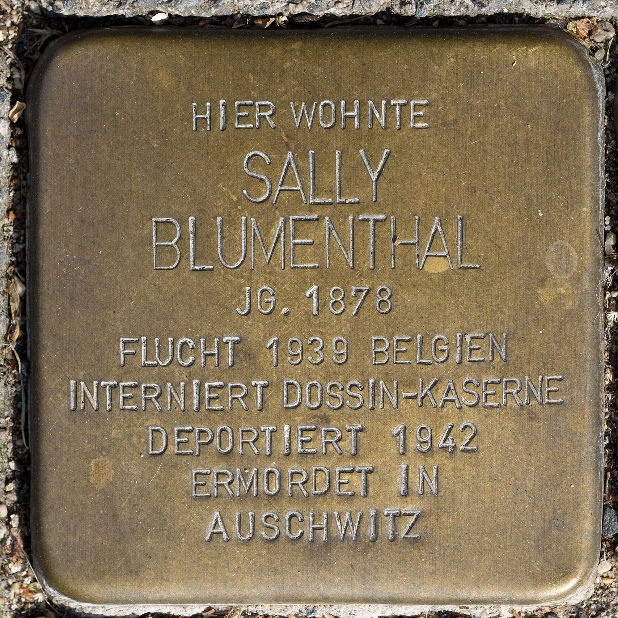 Stolpersteine MG: Blumenthal, Sally